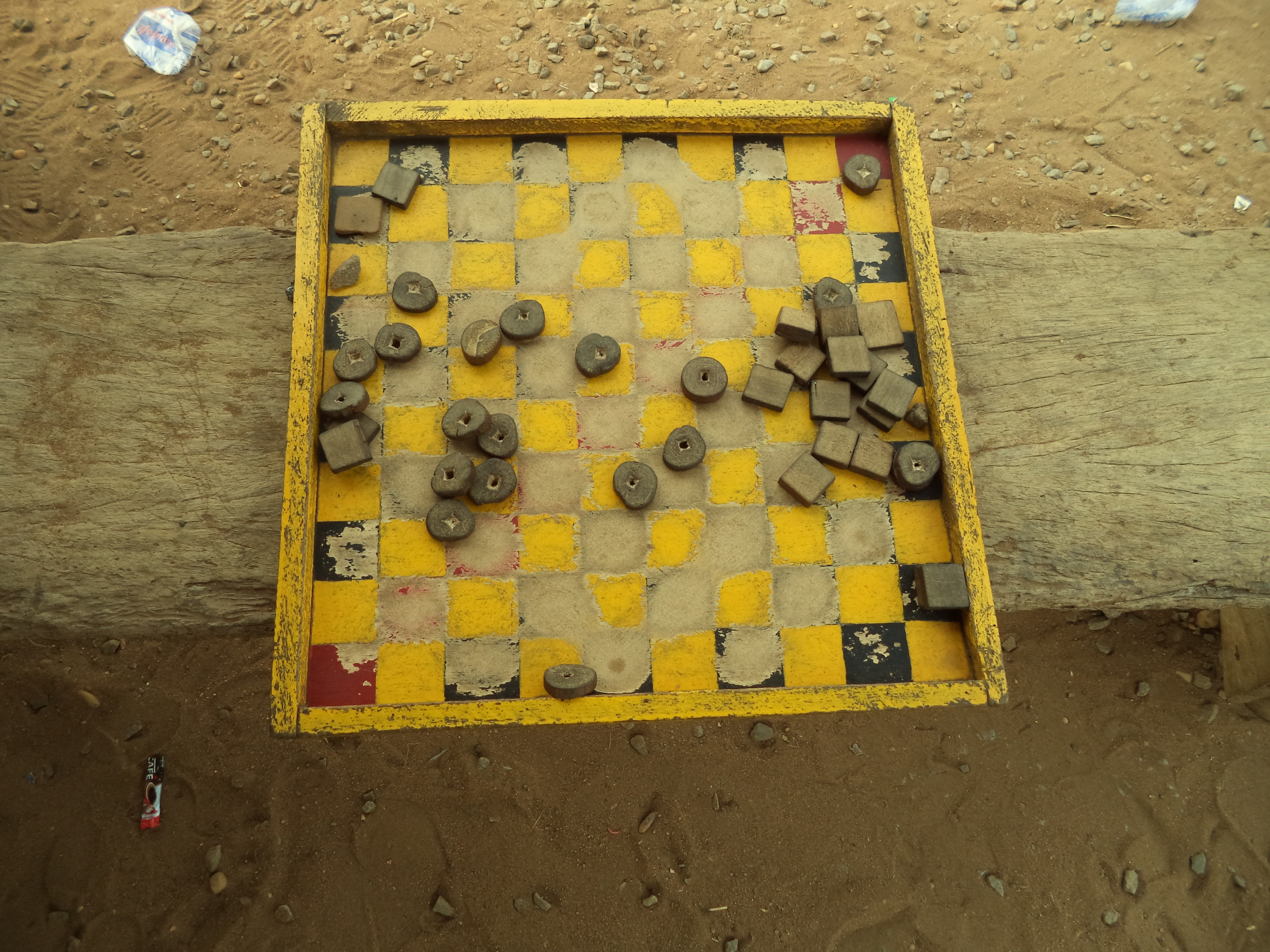 Le Damiens et les pignons.